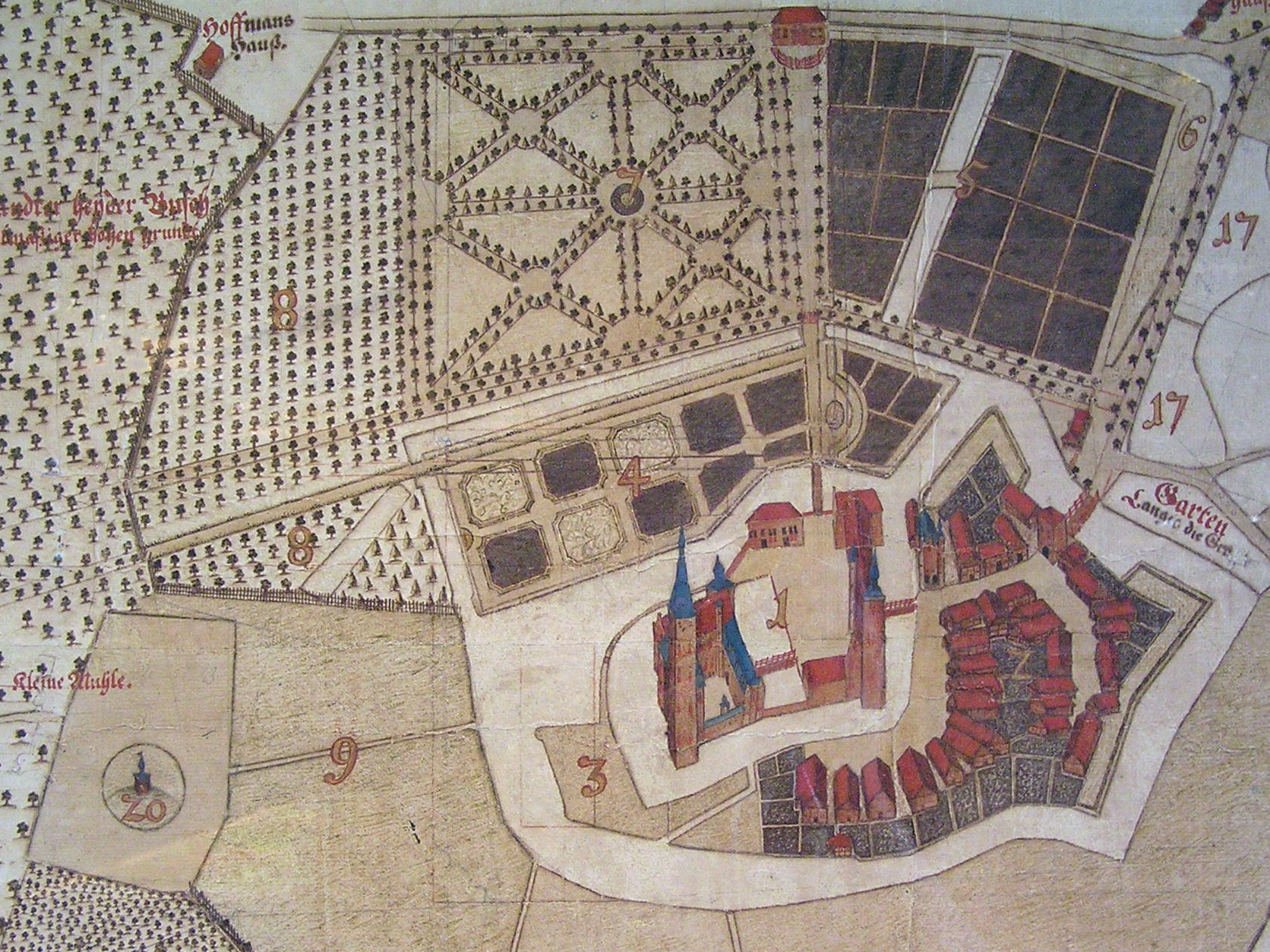 Detail der Karte von Tiergarten und Schloss Raesfeld um 1729